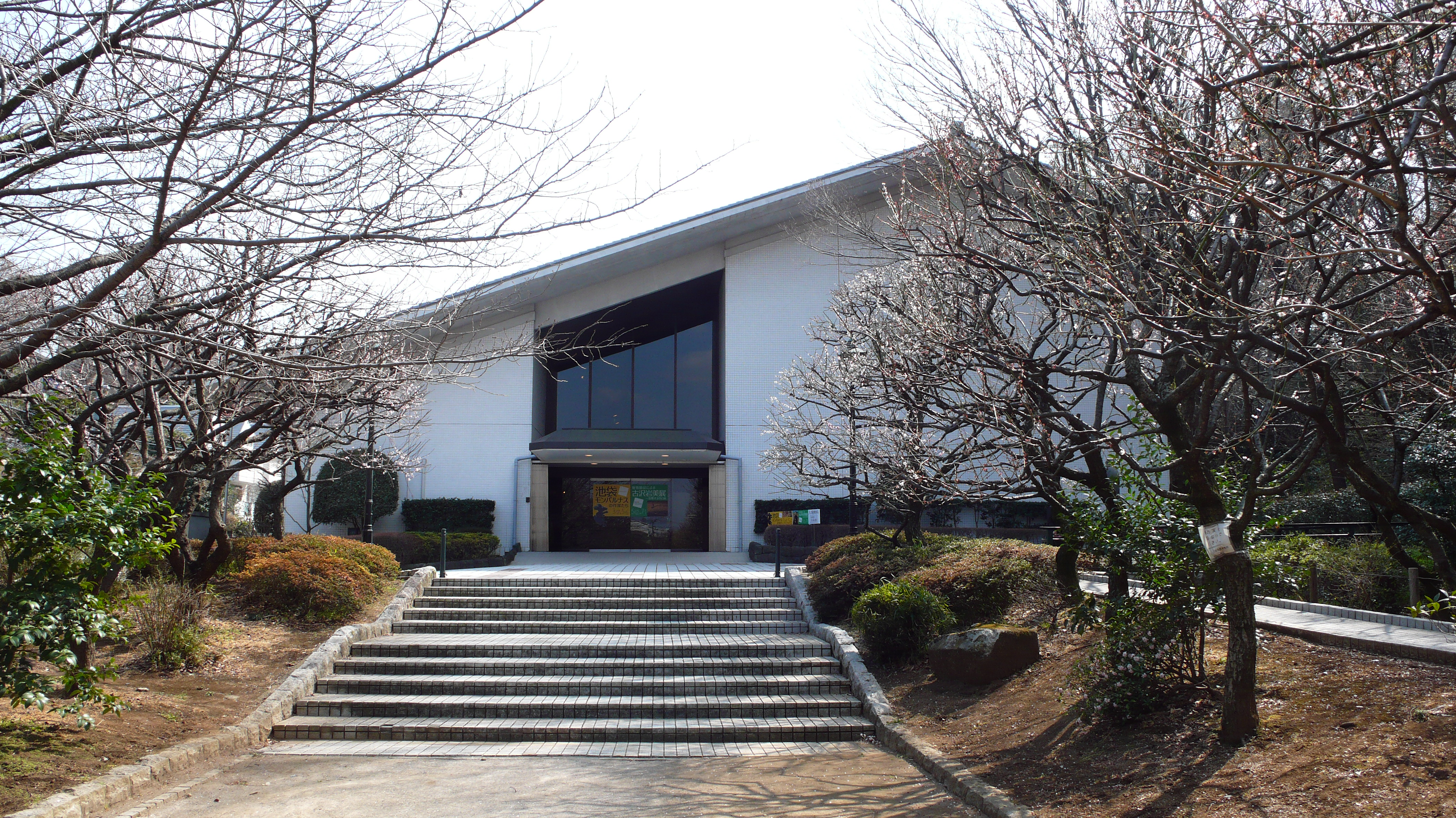 板橋区立美術館